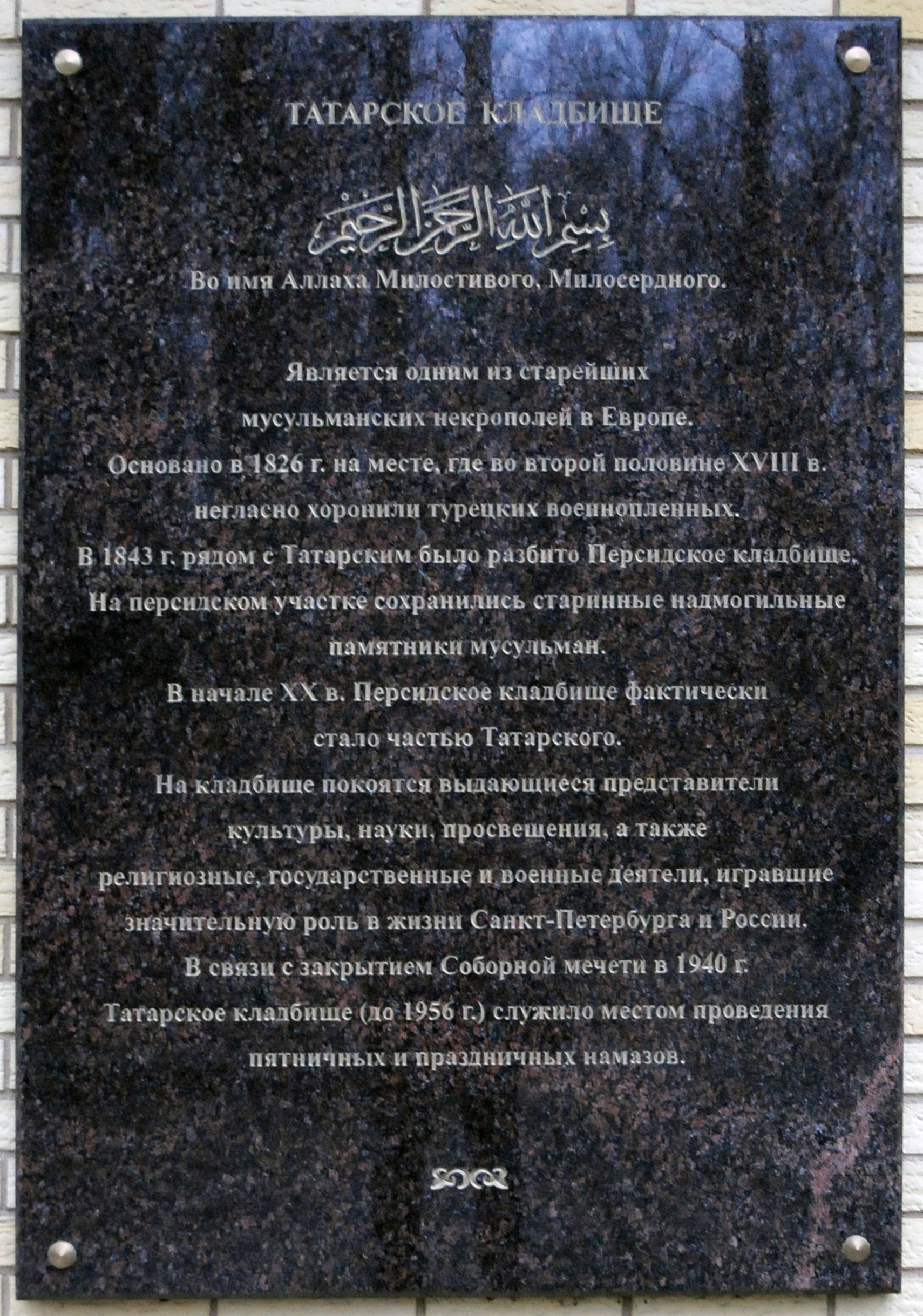 Информационная доска на Магометанском кладбище в Санкт-Петербурге